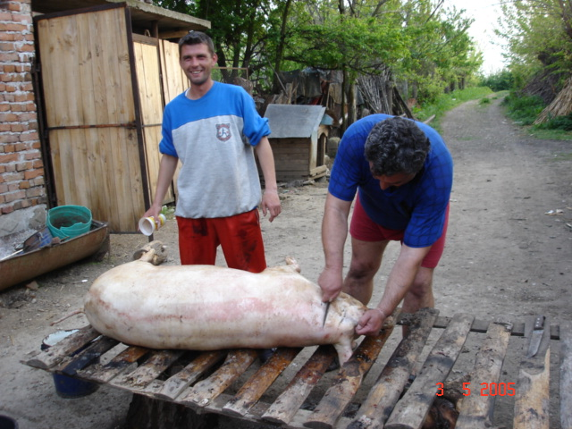 клане на свиня Autor: Anatoliy